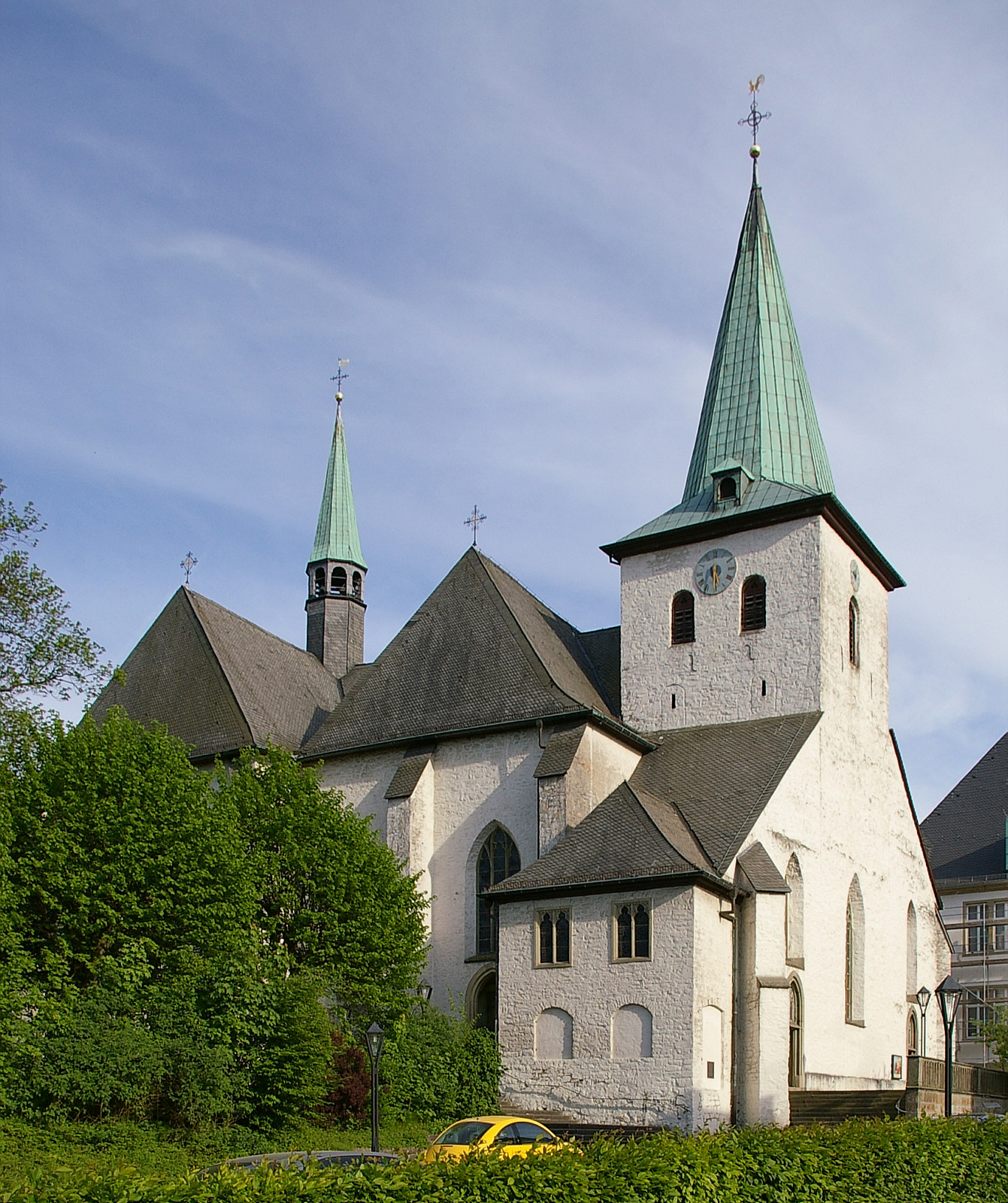 Propsteikirche, Arnsberg, Nordrhein-Westfalen.